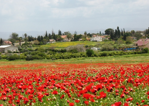 Talme-Menashe